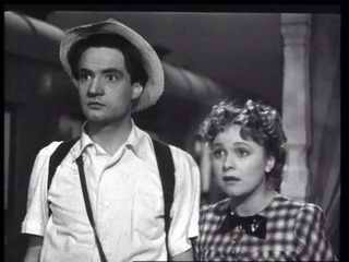 Павел Шпрингфельд и Людмила Целиковская в фильме «Сердца четырёх»